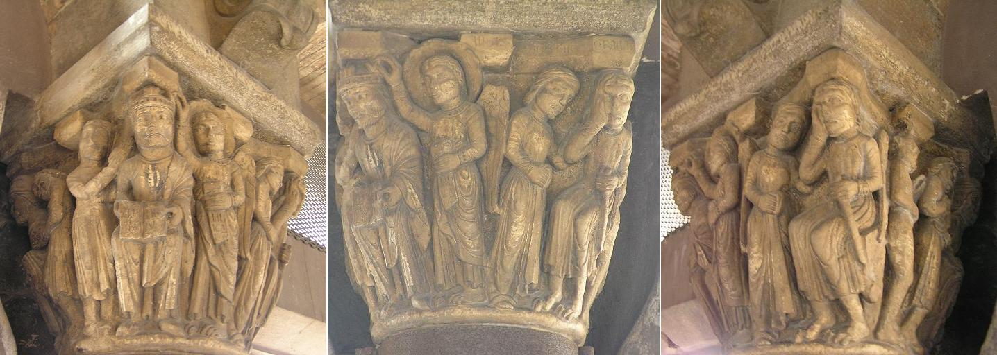 Capitello dei Giudici, nella sala dei Torresani, Ghirlandina.